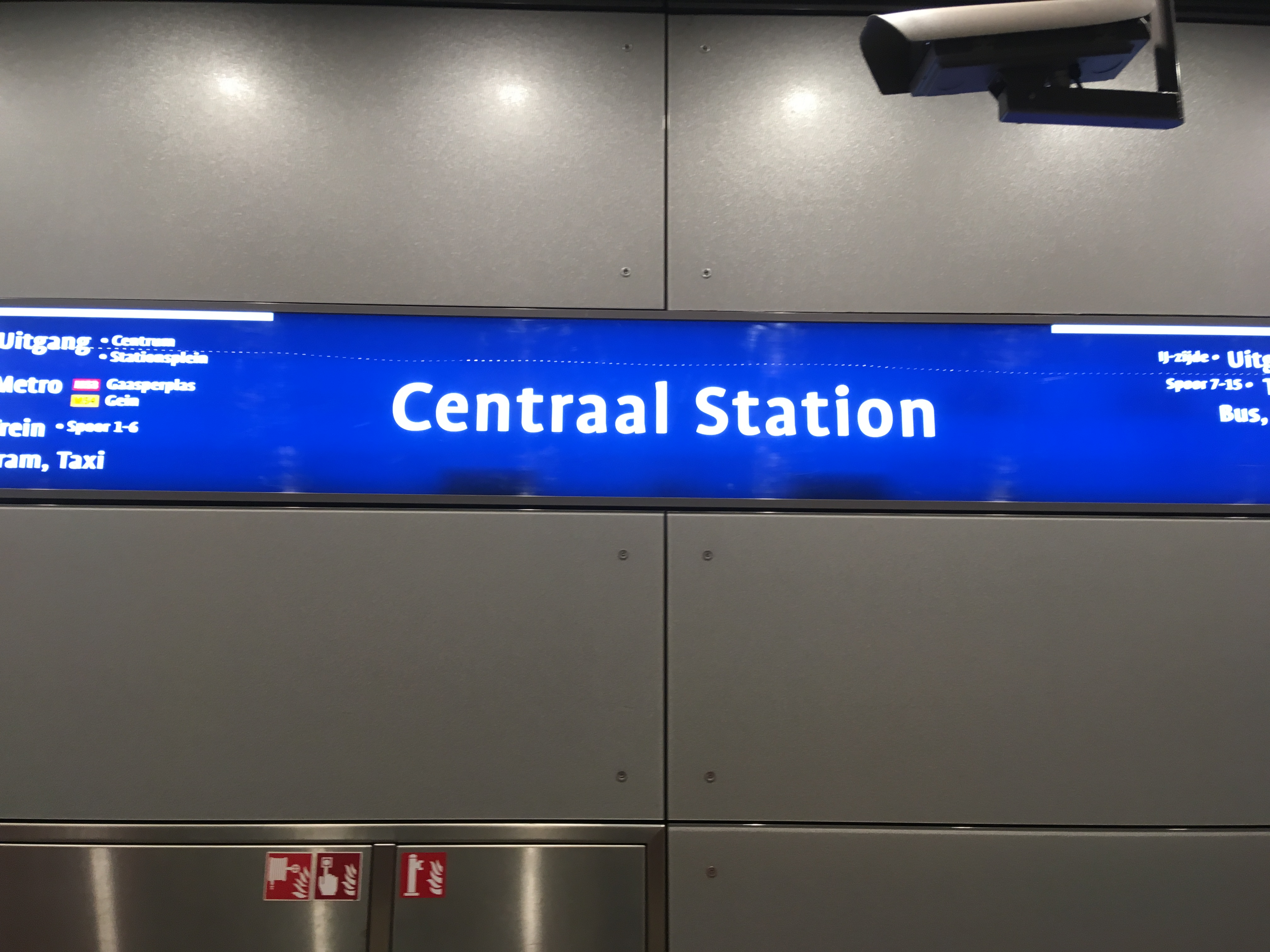 Stationsbord metrostation Centraal Station, Noord-Zuidlijn